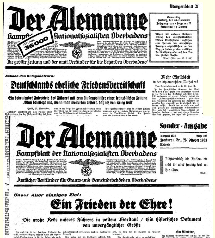 Bschriibig: Friidenspropaganda im nationalsozialischtische Parteiblatt Der Alemanne Copyright vu dr Orginalvorlag: Der Alemanne isch e anonyms Wärk. Noch em ditsche Ürheberrächt, § 66, sin anonymi Wärk 70 Johr no dr Vereffentligig frei. D Vorlag - Zittige üs em Johr 1933 - sin also gmeinfrei. Lizens: Diä Fotomontasch isch unter dr GNU Freiji Dokumentationslizenz freigä un derf unter dr Bedingige vu däre Lizens kopiärt, verbreitet un veränderet wäre. Autor vu dr Fotomontasch: Albärt